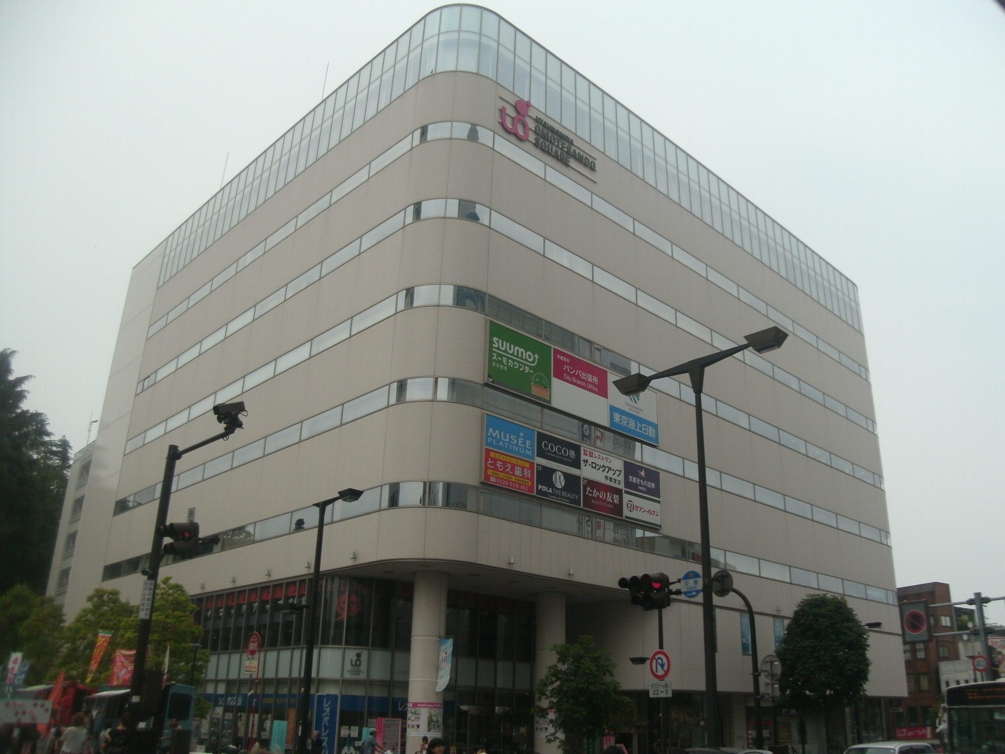 うつのみや表参道スクエア